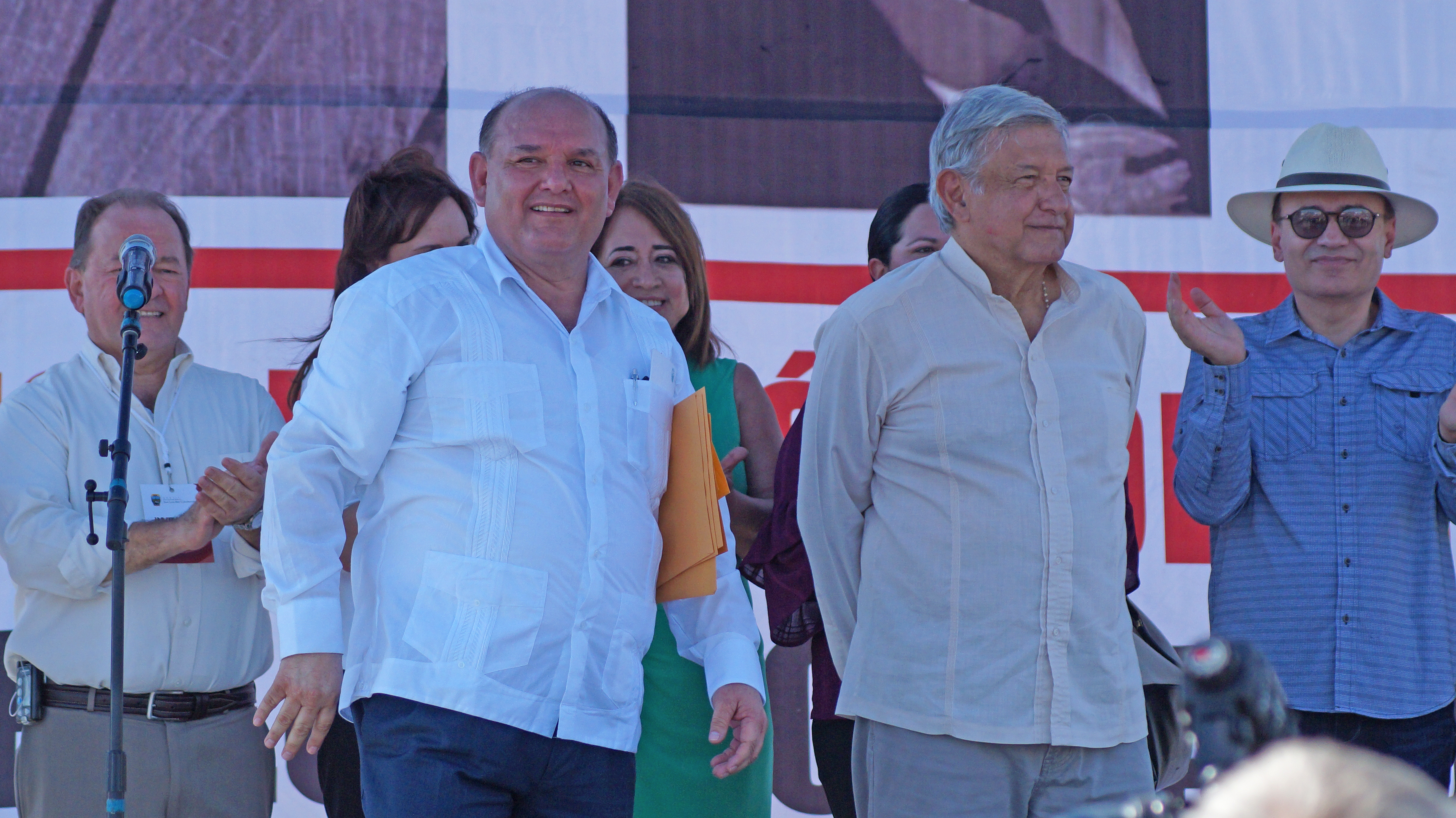 Visita del Presidente electo de la República Mexicana Andrés Manuel López Obrador a San Luis Río Colorado, Sonora, lo acompaña el Presidente Municipal Santos González Yescas.